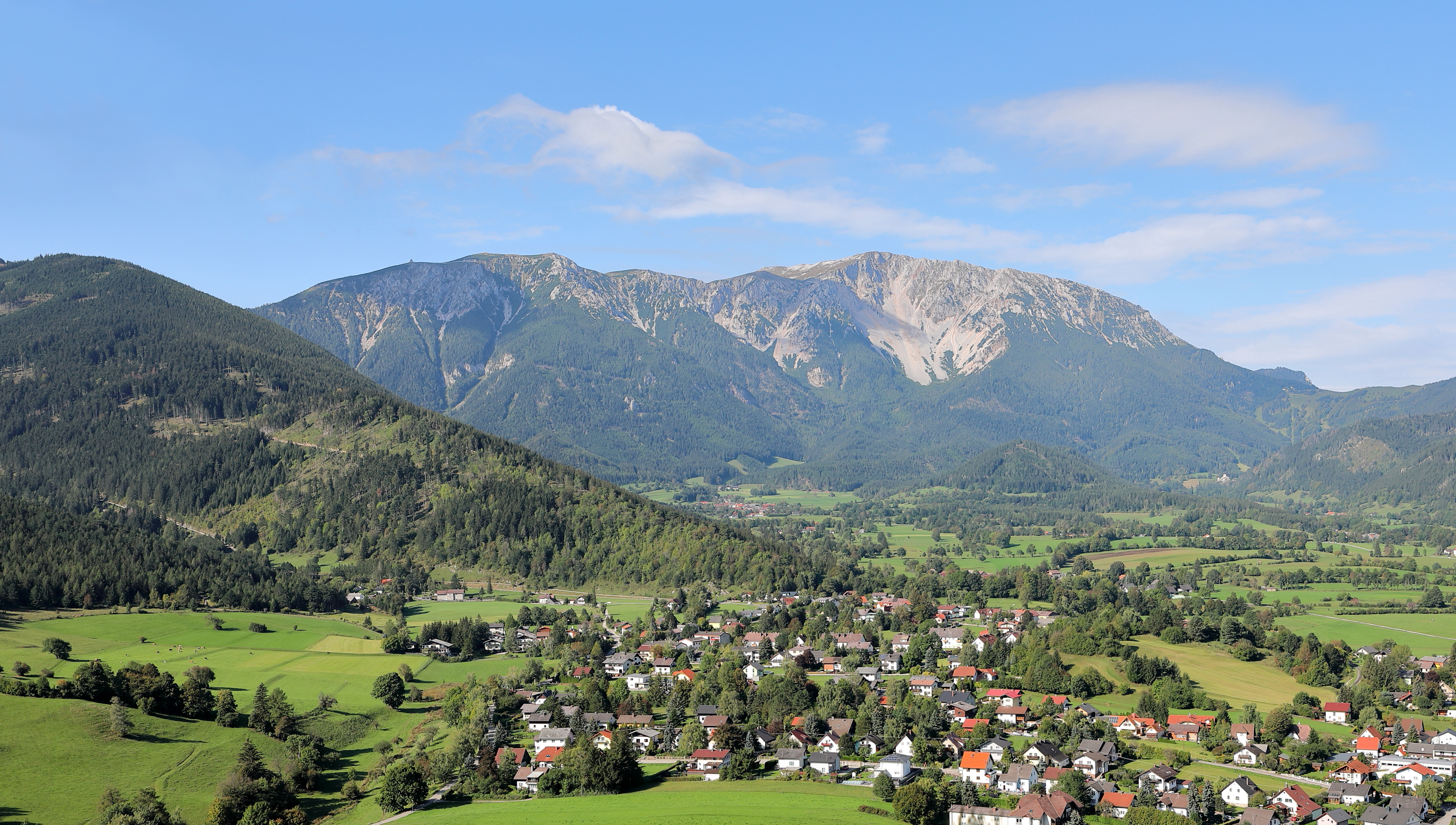 Ostnordostansicht des Schneebergmassivs vom Himberg in der niederösterreichischen Marktgemeinde Puchberg am Schneeberg.